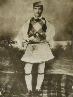 Николаос Панайоту.